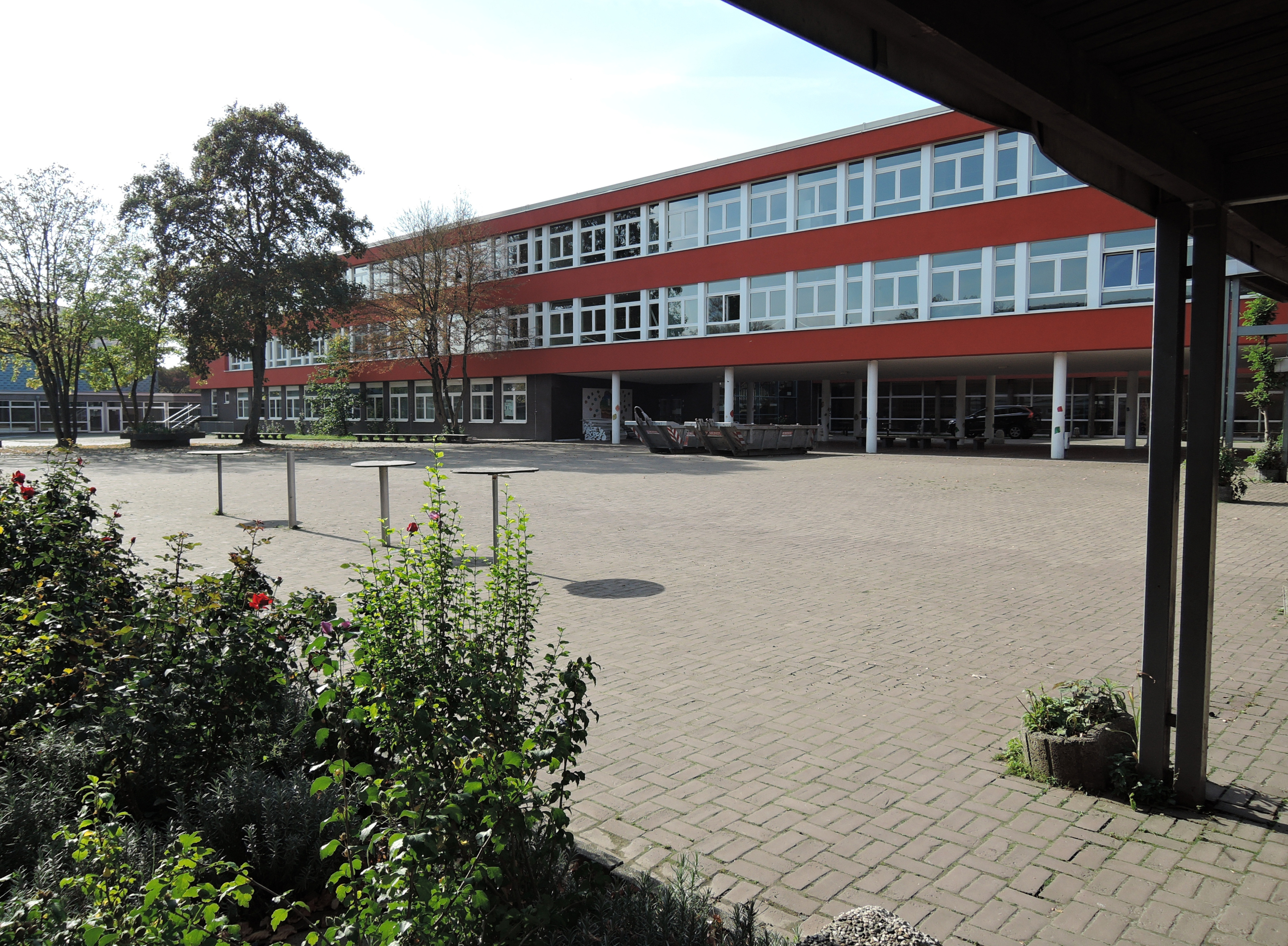 Städtisches Gymnasium Gerresheim